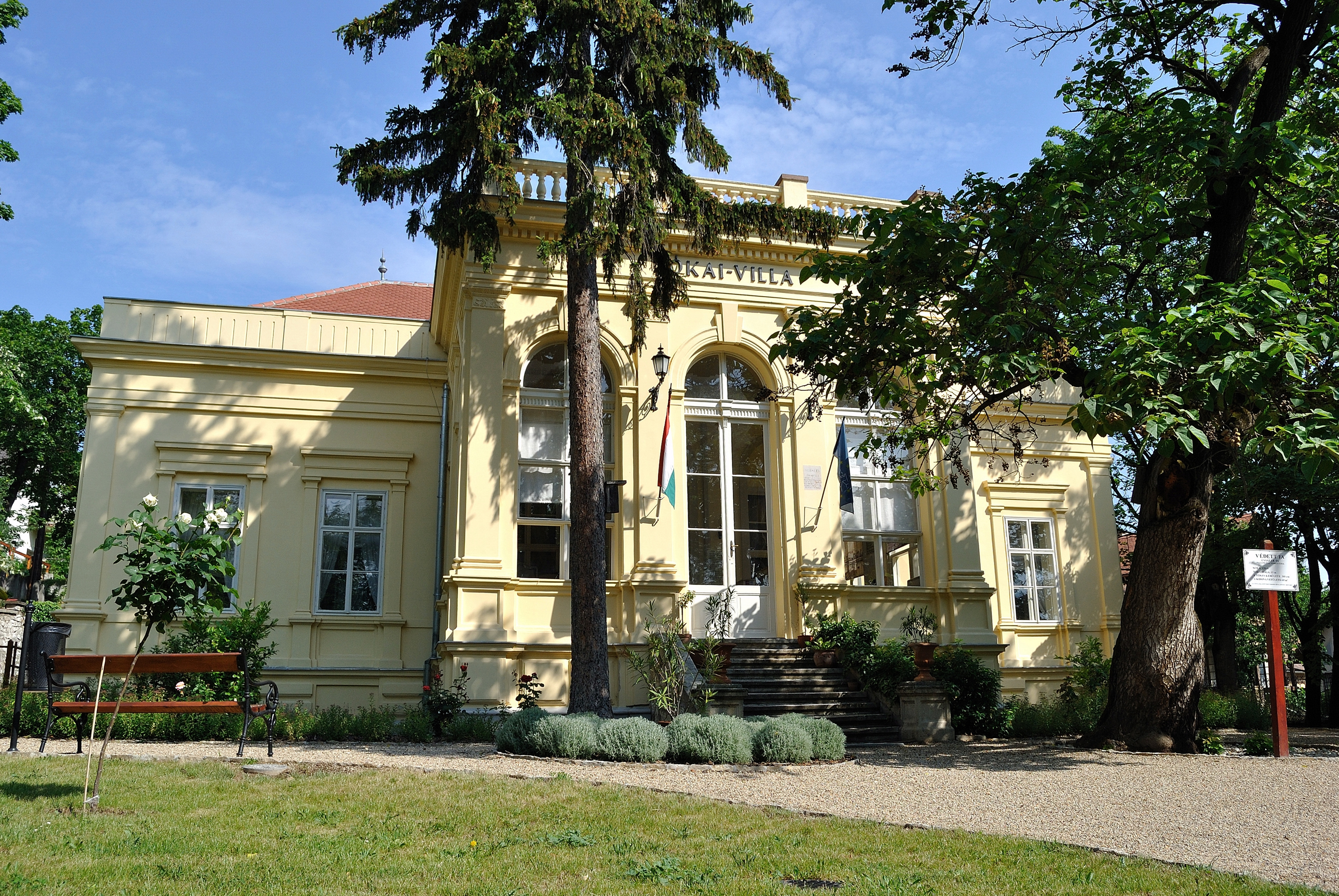 Jókai Mór Emlékház. Balatonfüred. Honvéd u. 1 This is a photo of a monument in Hungary. Identifier: 9706